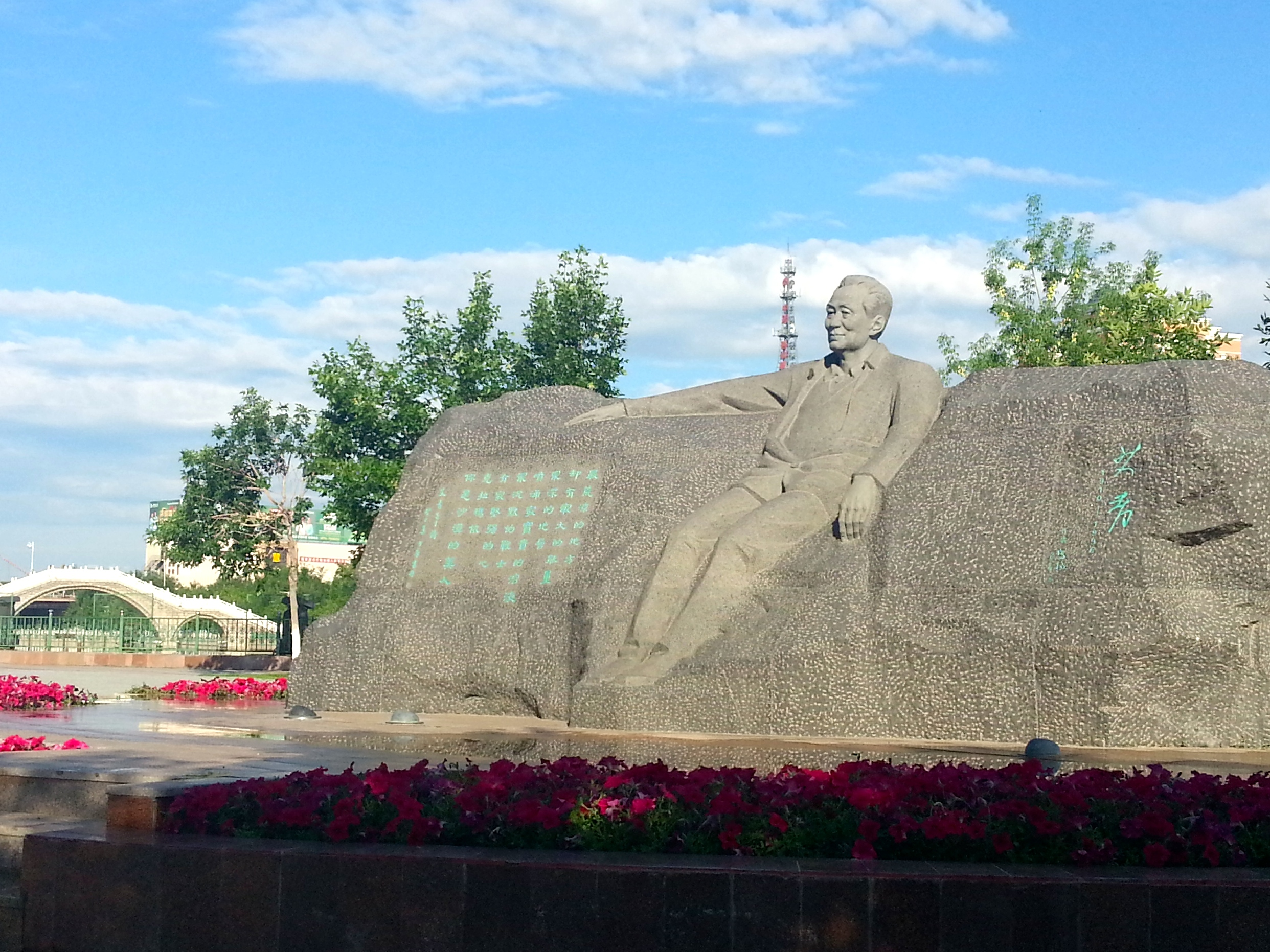 Statue av Ai Qing i sentrum av Karamay.